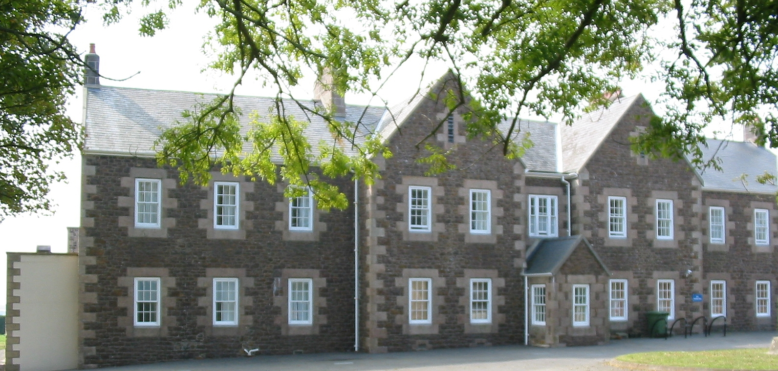 Nrf: Jèrri